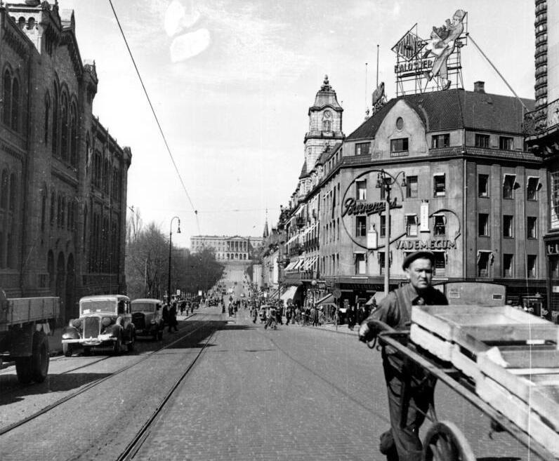 Hauptverkehrsstraße in Oslo (Karl Johannesgat) im Hintergrund das kgl. Schloß